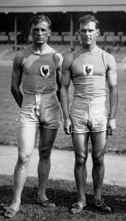 VIIes Olympiades à Anvers : équipe française de saut en longueur avec élan : de gauche à droite : Guezille, Orfidan : [photographie de presse] / Agence Meurisse